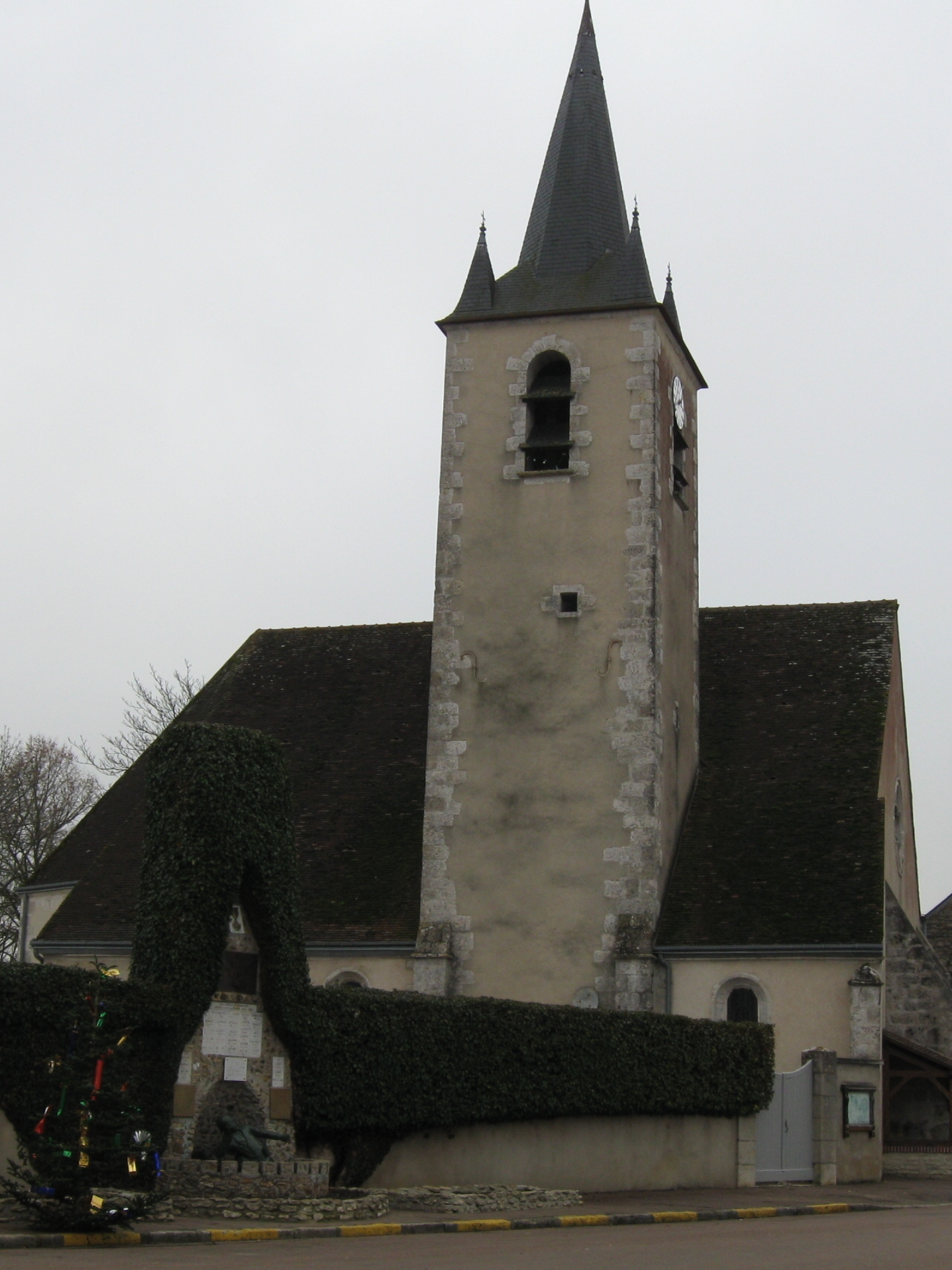 Dammarie-sur-Loing, l'église et le monument aux morts.